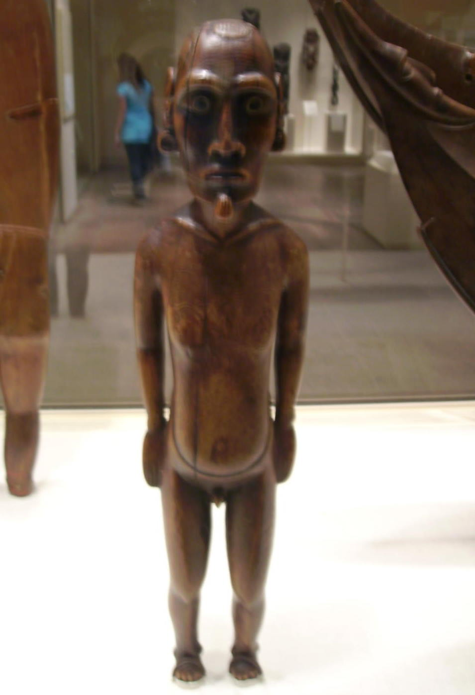 Moai Tangata, Holzfigur von der Osterinsel (H. ca. 40 cm); Metropolitan Museum of Art, New York City